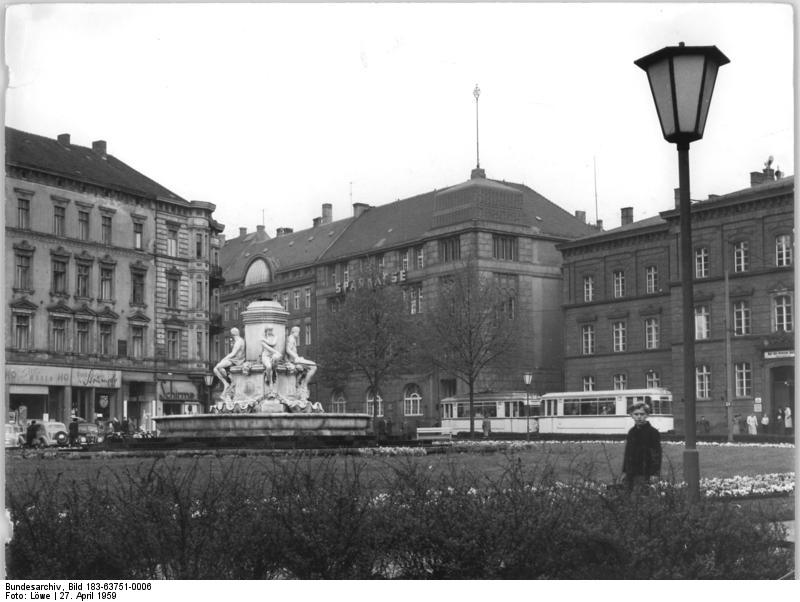 Görlitz, Platz der Befreiung, Brunnen Zentralbild Löwe Vgt-Noa 27.4.1959 Vorbereitendes Material: Europäische Gewerkschaftskonferenz an der Oder-Neiße-Friedensgrenze Internationale und nationale Gewerkschaftsorganisationen verschiedenster Weltanschauung und Richtung fast aller europäischen Länder sind zur Teilnahme an der Internationalen Konferenz der Gewerkschaften und Werktätigen Europas für einen Friedensvertrag mit Deutschland, für Abrüstung und für das Verbot der Atomwaffen vom 8. bis 10. Mai in Görlitz eingeladen worden. (Näheres siehe ADN-Meldung Nr. 216 v. 23.4.1959) UBz: Platz der Befreiung mit Kunstbrunnen.